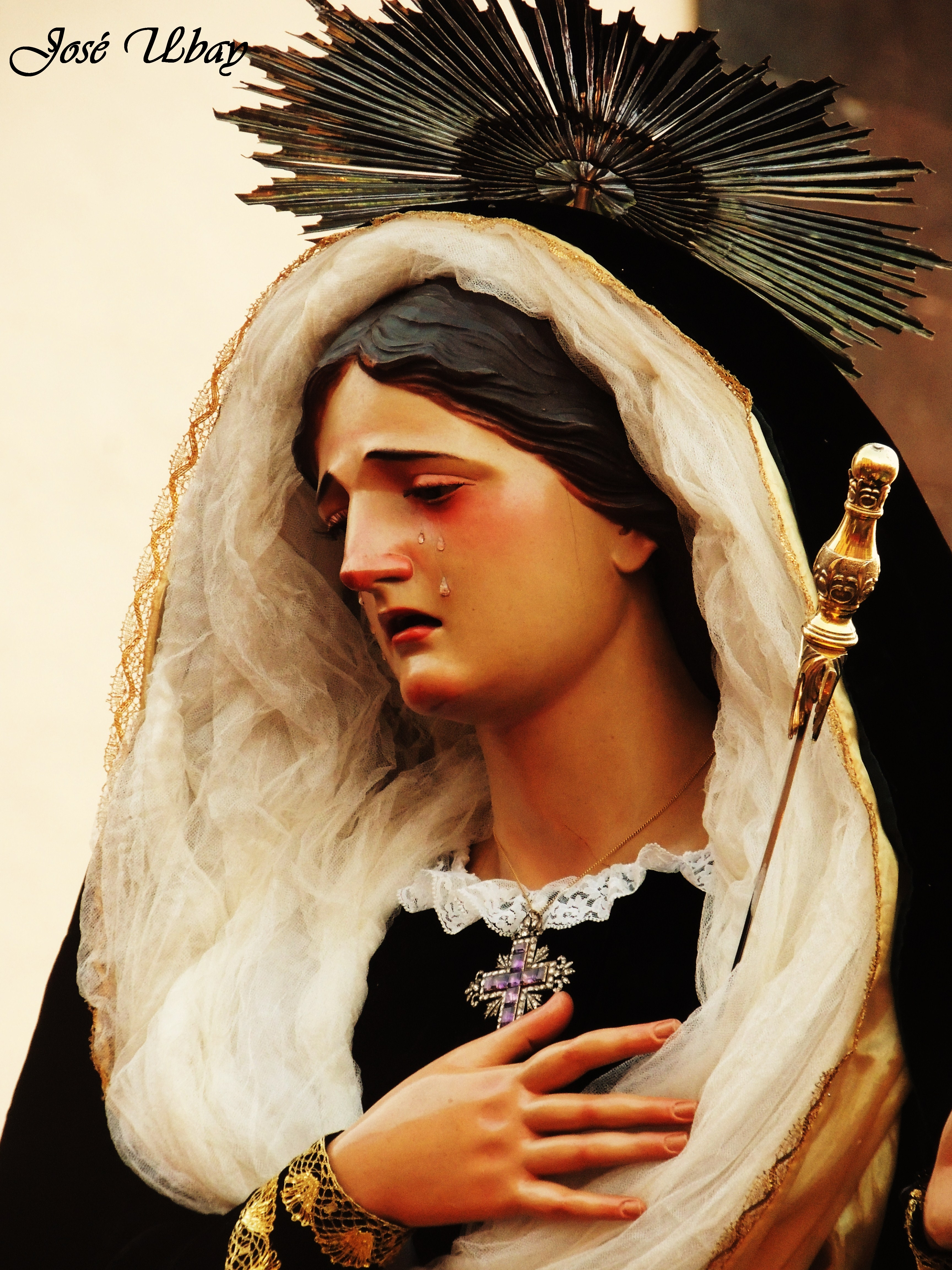 Nuestra Señora de los Dolores. Siglo XIX. Parroquia Matriz de Nuestra Señora de la Concepción. Villa de la Orotava - Tenerife.